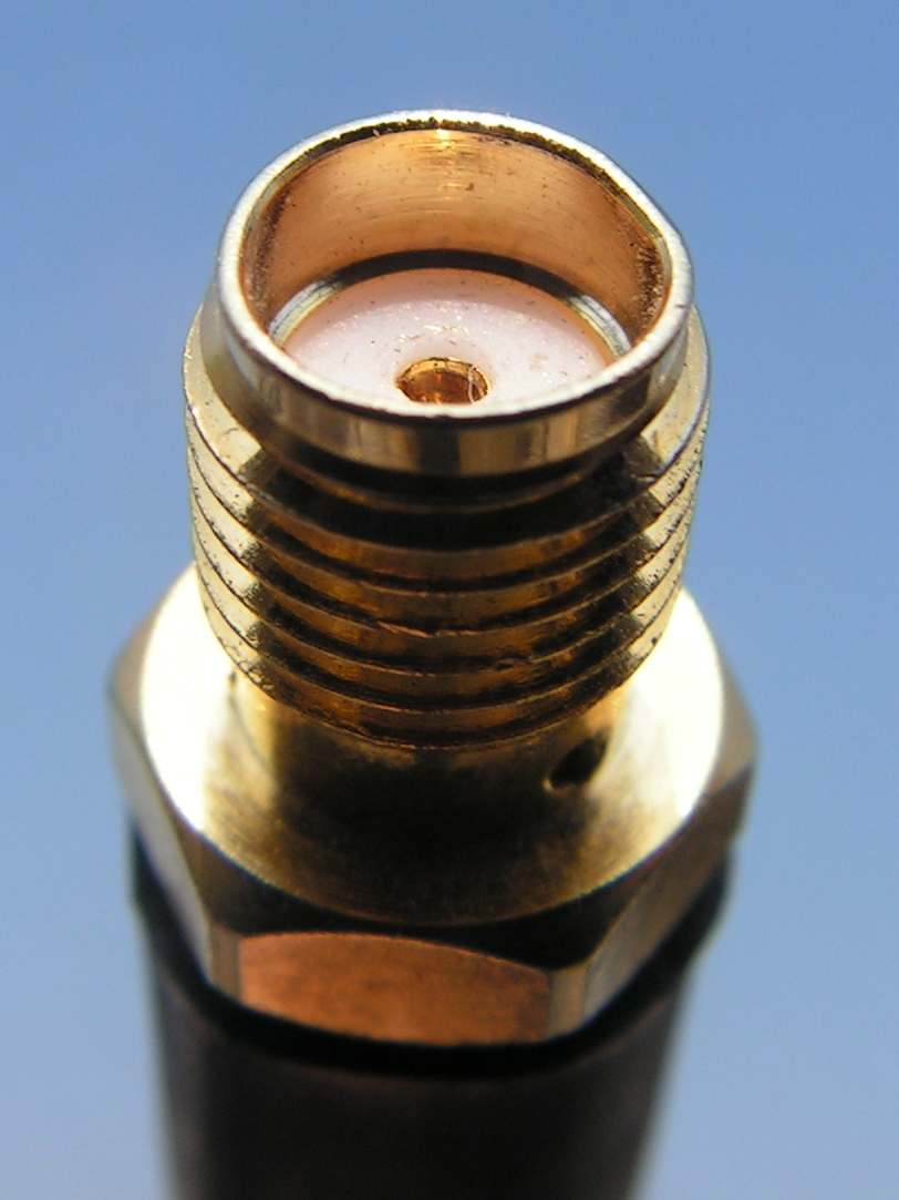 Gniazdo SMA